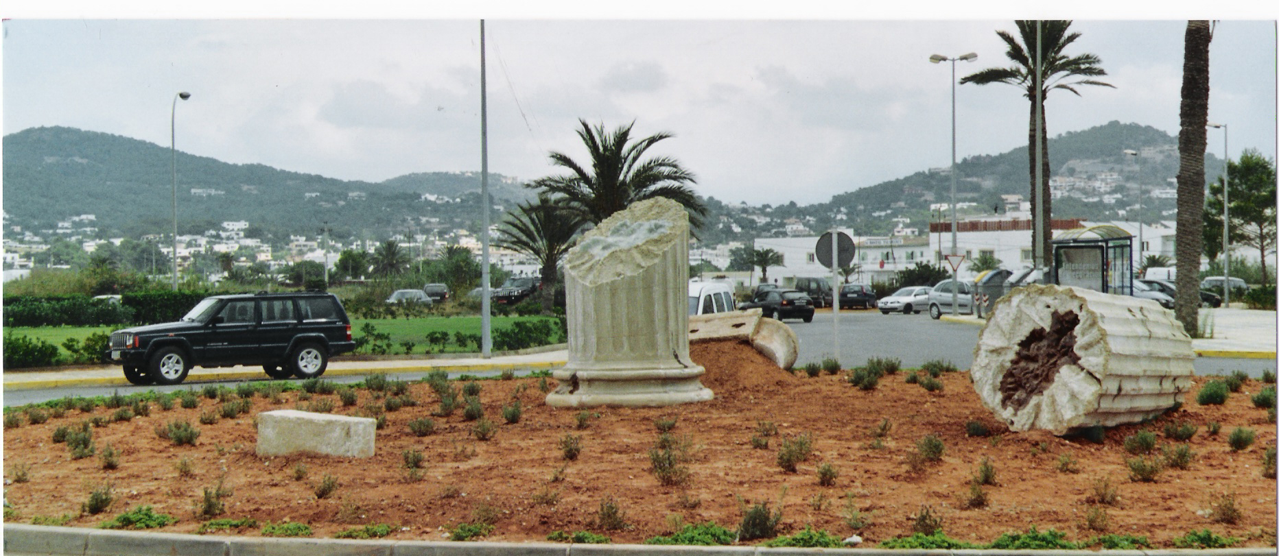 Escultura de Frédéric Berthelot en Ibiza. El paseo marítimo de Ibiza caracteriza la extraordinaria transformación moderna de extensión de Ibiza. Para la realización de esta rotonda, mediante una creación simbólica de un yacimiento arqueológico que se inspira en la riqueza histórica y mítica de la isla, descubrimos, entre otros elementos, una columna estrellada en dos partes; la base erguida deja aparecer en su núcleo una piedra mineral al relieve de la preciosa isla, Ibiza. La parte de la columna caída al suelo desvela en su extremidad quebrantada el negativo de la isla como si fuera la ganga del mineral. Ésta misma del color de la tierra roja tan propia y particular de la isla. En la actualidad esta escultura está parcialmente destruida por un accidente de tráfico y a la espera de su reconstrución por parte del ayuntamiento.